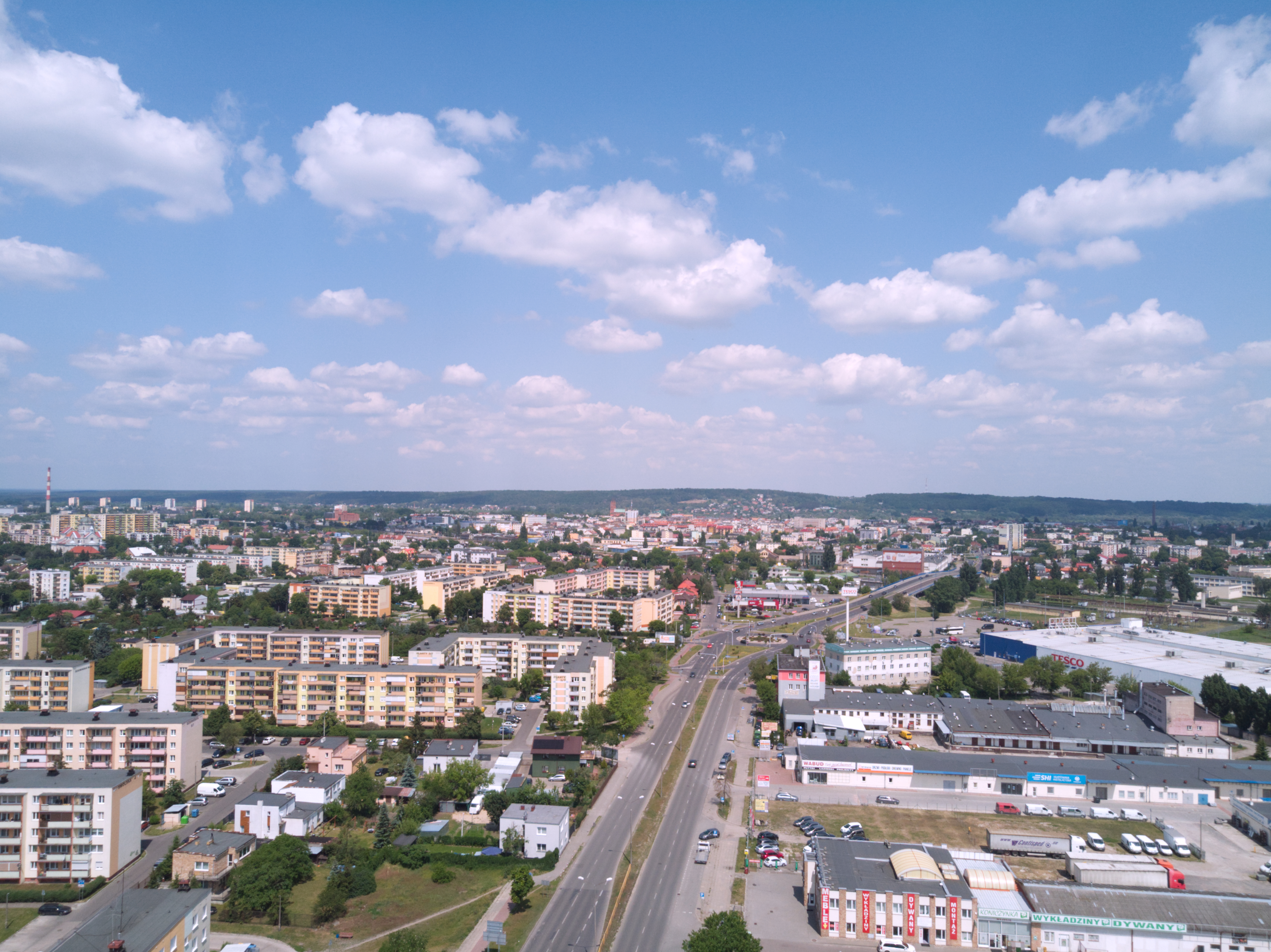 Dzielnica Południe z lotu ptaka (2020 r.)